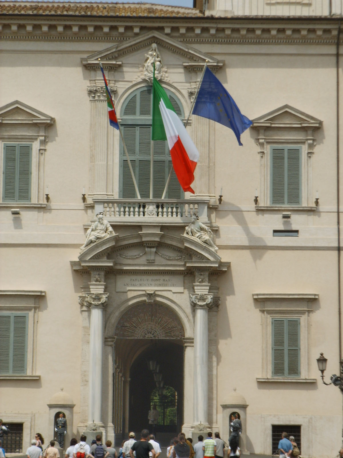 Quirinale Square in Rome, Italy